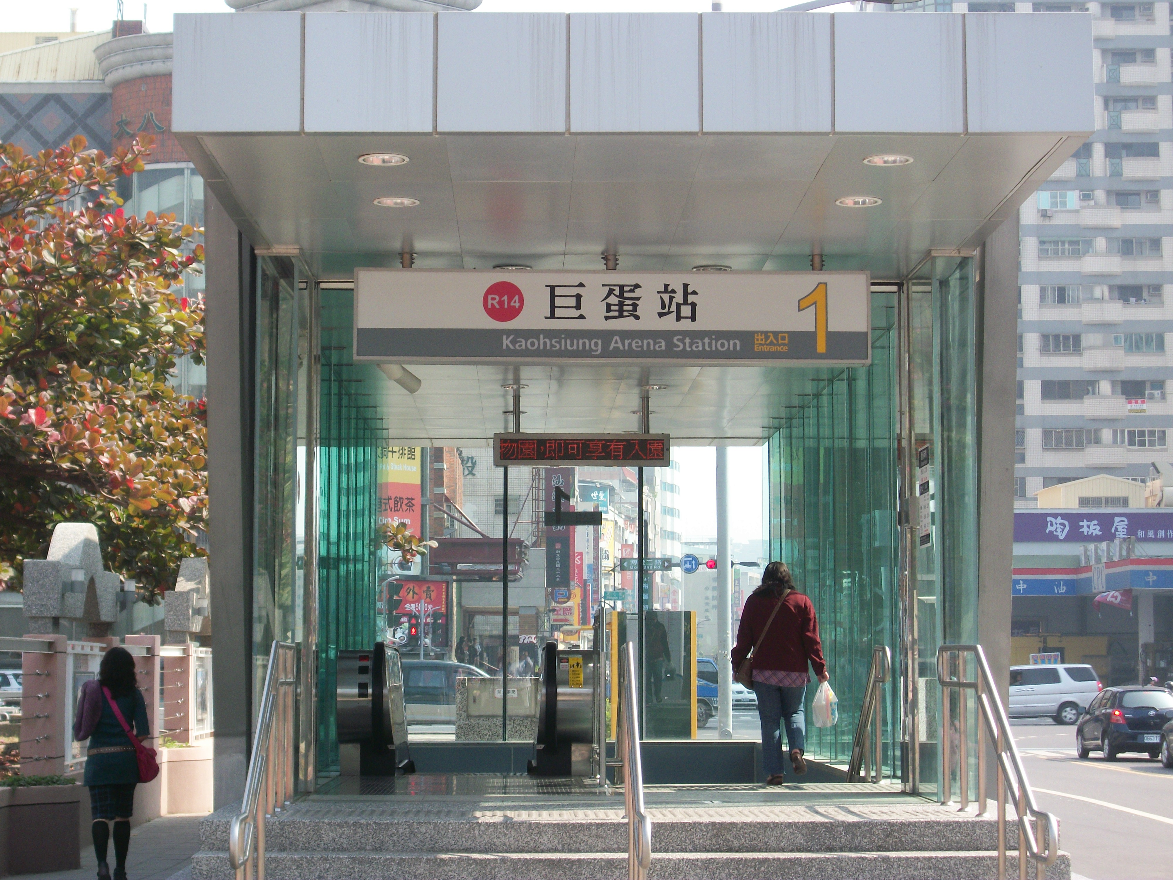 中文（台灣）: 高雄捷運巨蛋站一號出口。